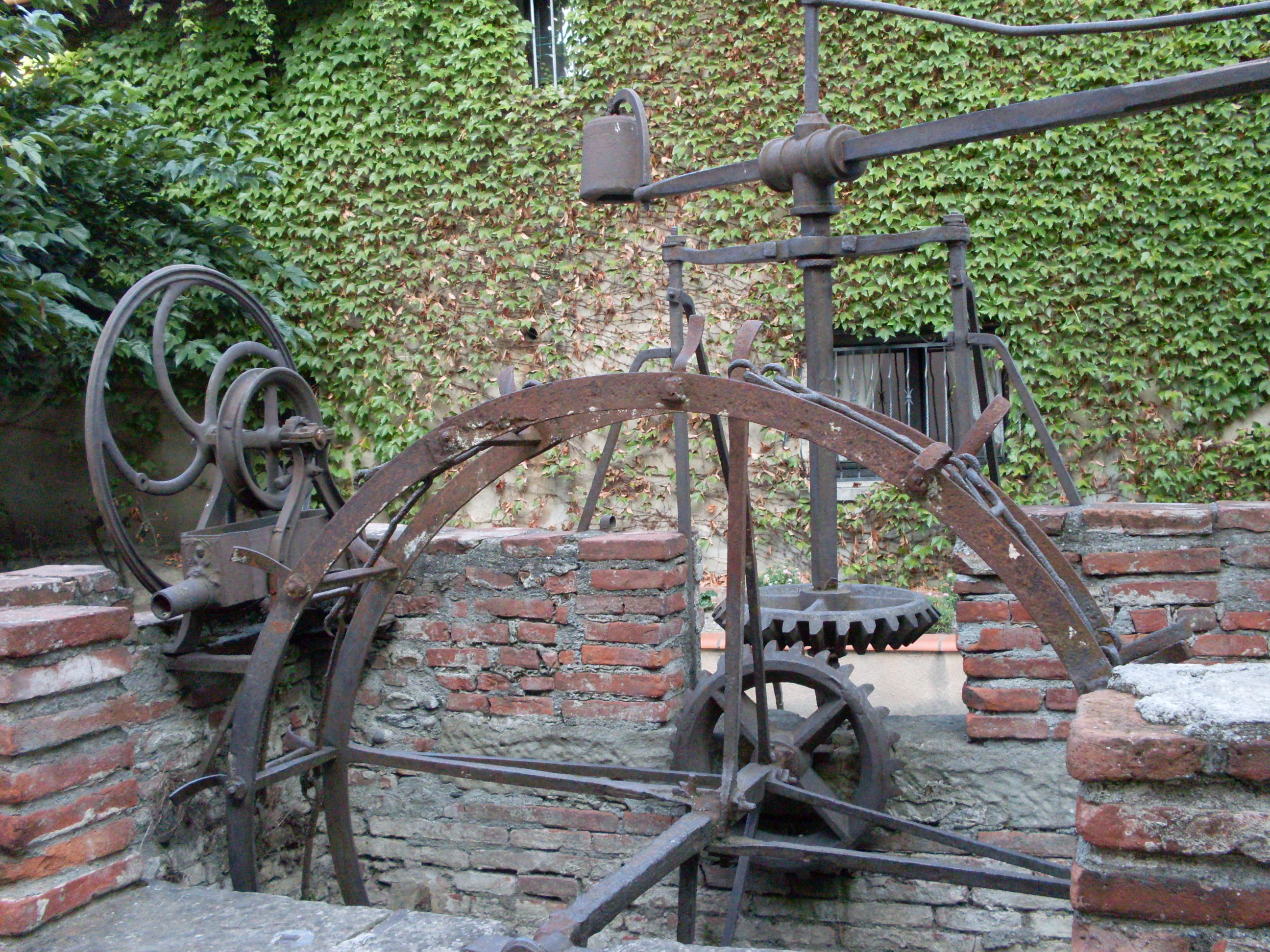 Noria devant le Jardin Claude Nougaro, Avenue des Minimes, Toulouse